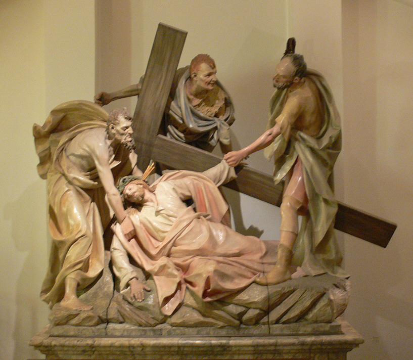 Bürgersaal, München: Kreuzweg in der Unterkirche, Kreuzwegstationen vom Ende des 19. Jh.